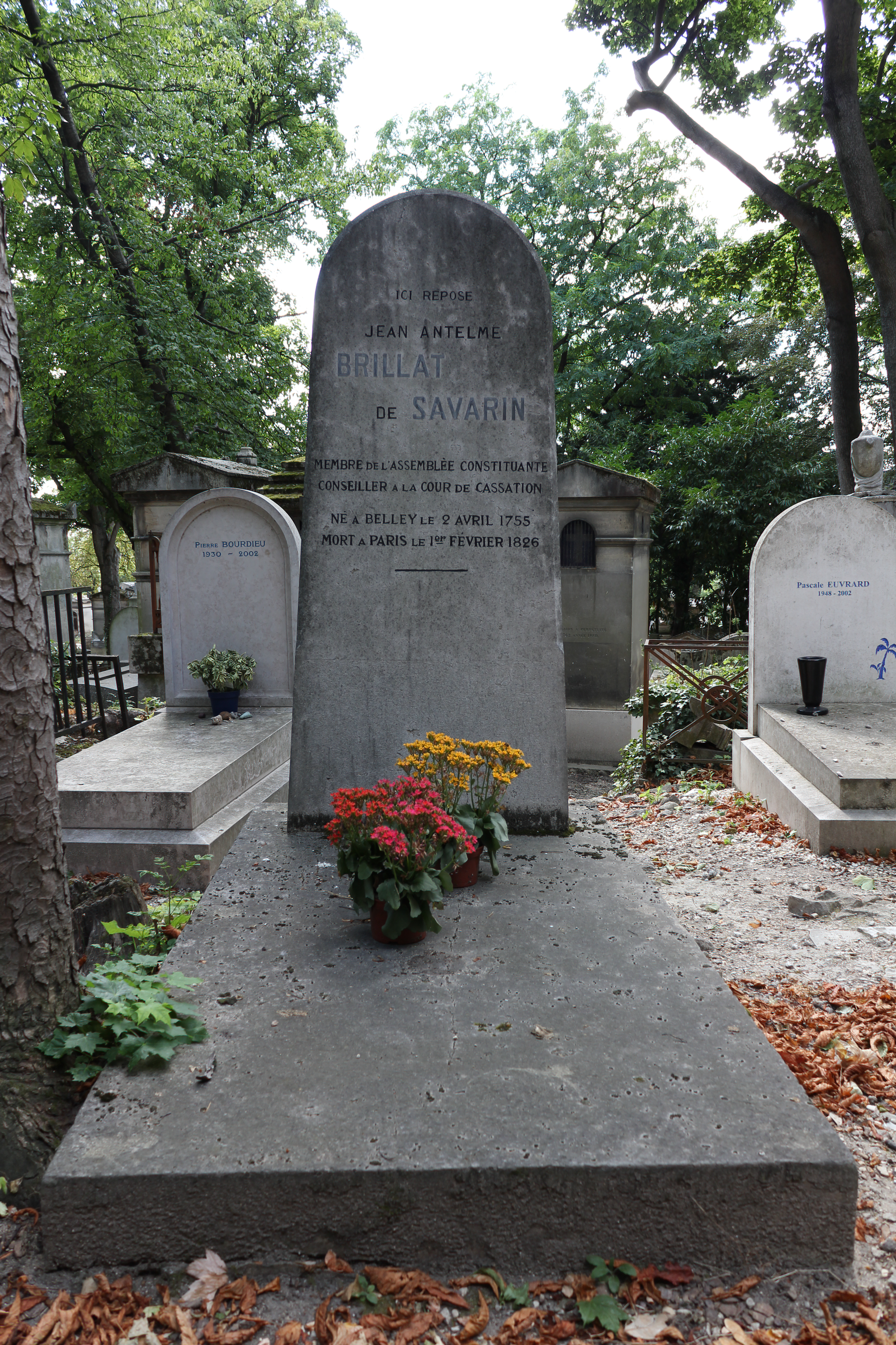 Sépulture de Jean Anthelme Brillat-Savarin (1755-1826), avocat, magistrat, gastronome et auteur culinaire.